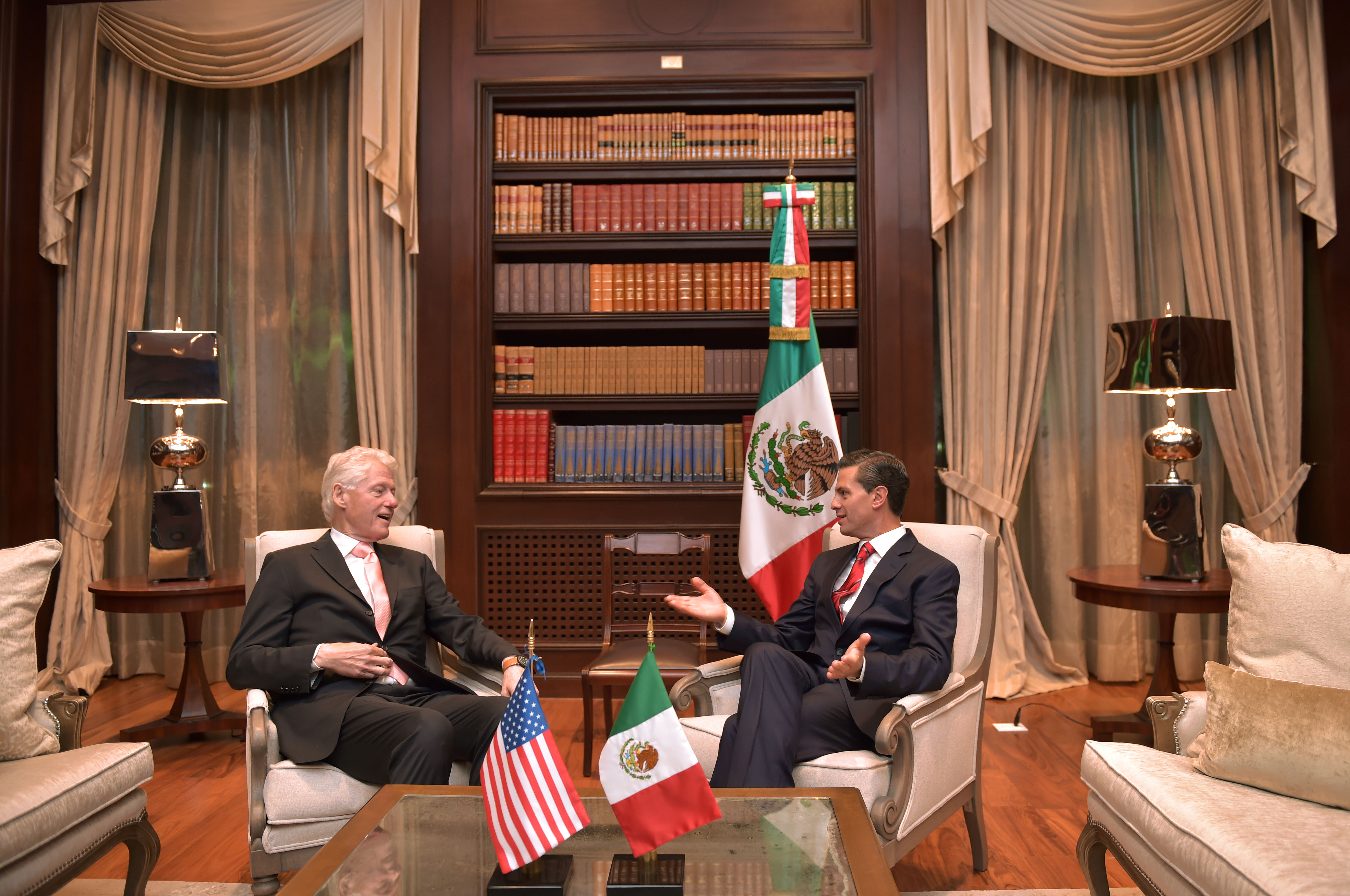 Reunión con el expresidente de los Estados Unidos de América, Bill Clinton. Residencia Oficial de los Pinos, Ciudad de México. 06 de febrero de 2015.